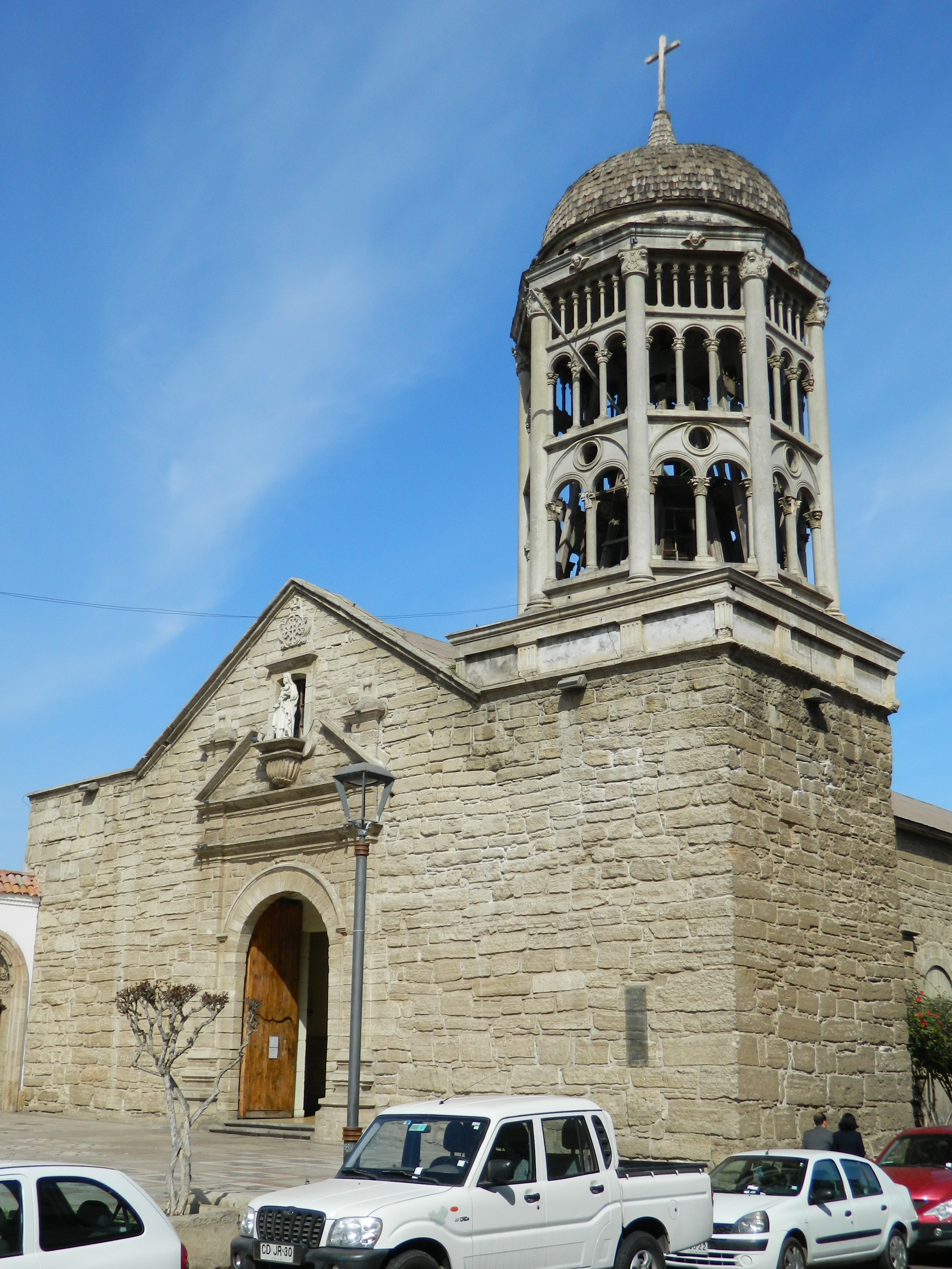 Iglesia de Santo Domingo This is a photo of a national monument in Chile: 447